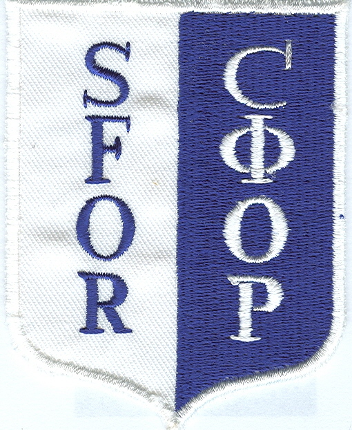 Badge/embleem SFOR